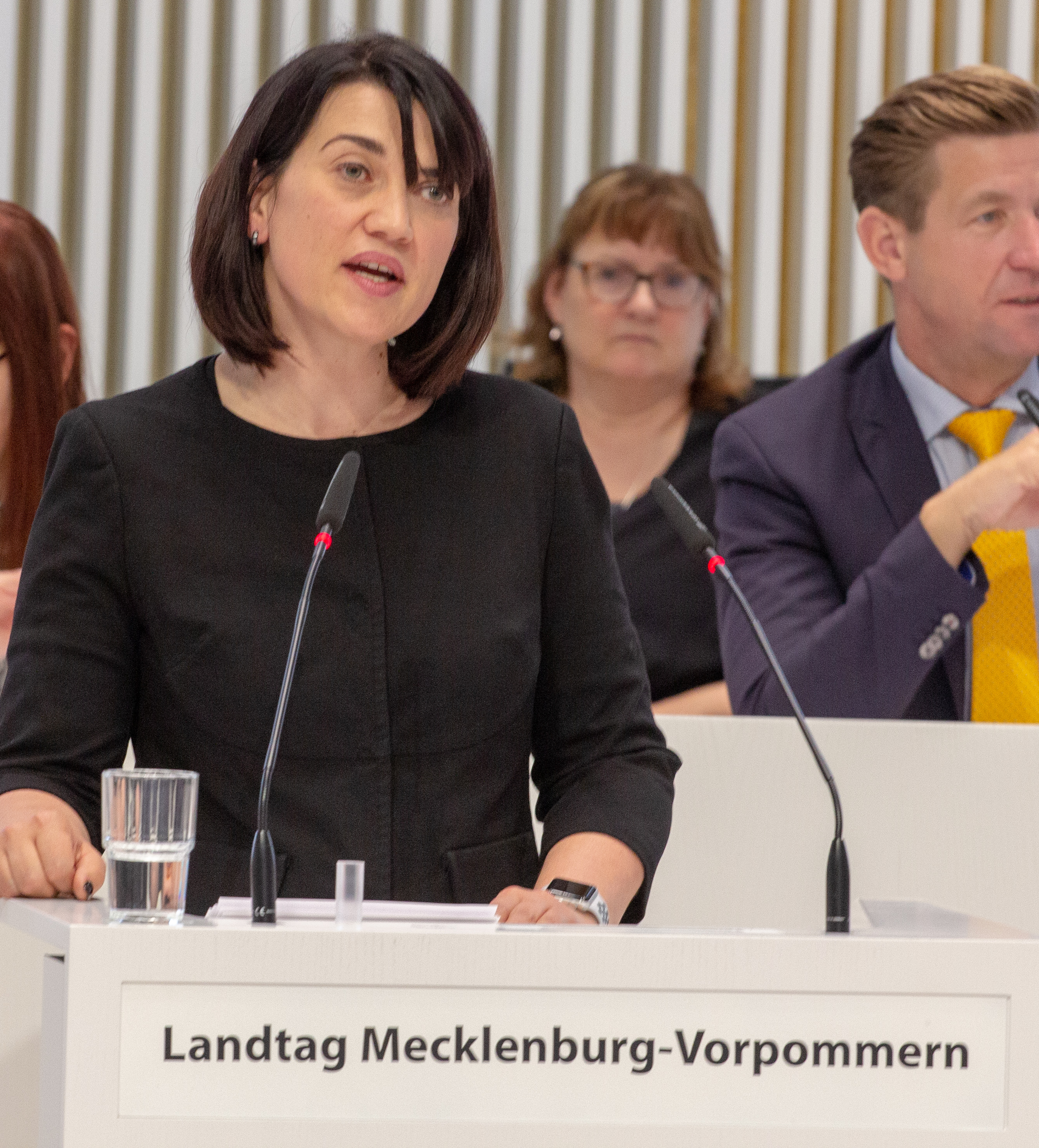 Jacqueline Bernhardt im Plenum des Landtages Mecklenburg-Vorpommern im März 2019.